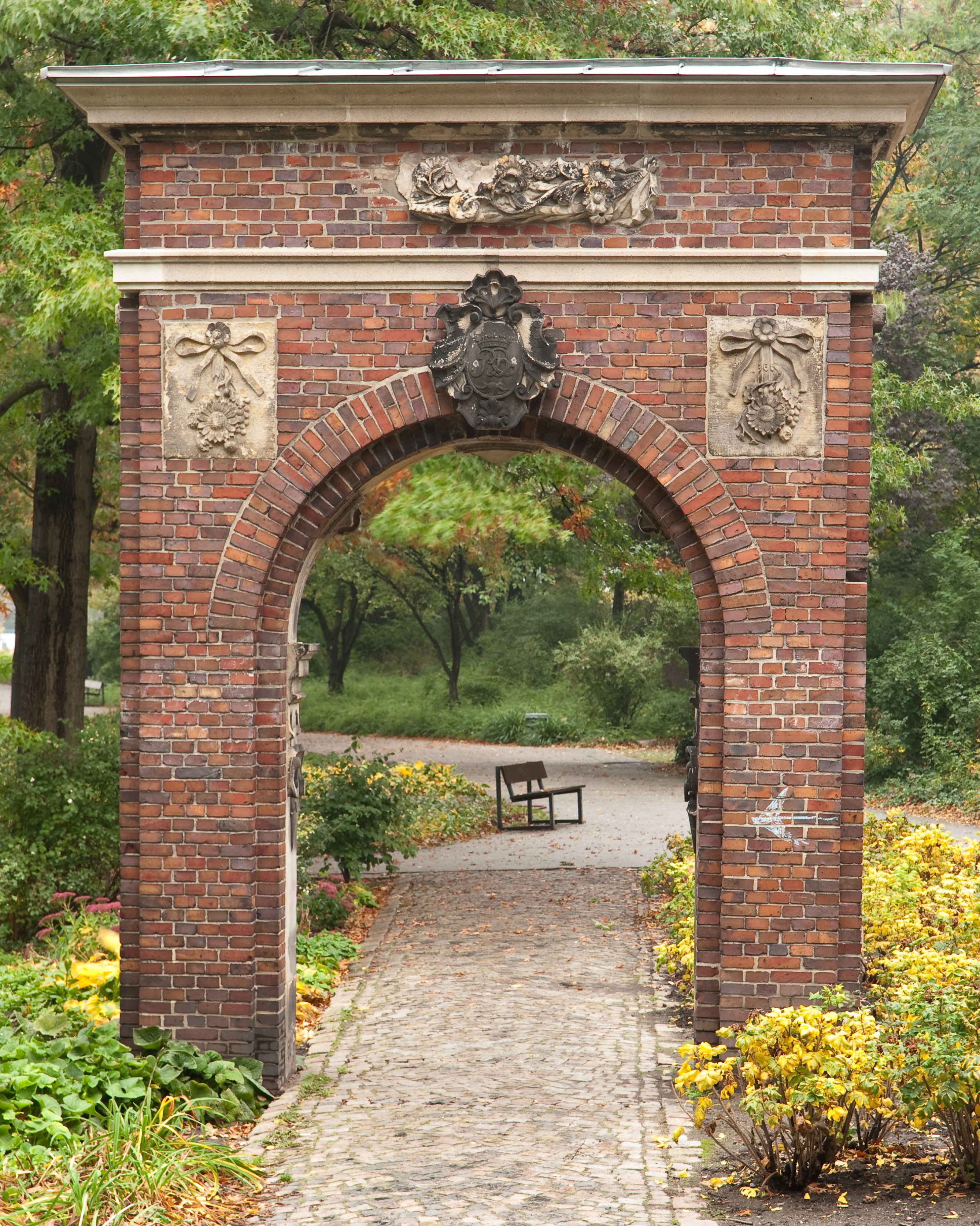 Rückseite des Portals für das ehemalige "Rote Haus" in Große Reichenstraße 49, Hamburg. Das Portal stammt aus dem Jahre 1617. Oben in der Mitte befindet sich eine Kartusche mit den Buchstaben "RB" von dem Haus Große Reichenstraße 37, Hamburg. Die Kartusche stammt aus dem Jahre 1745.